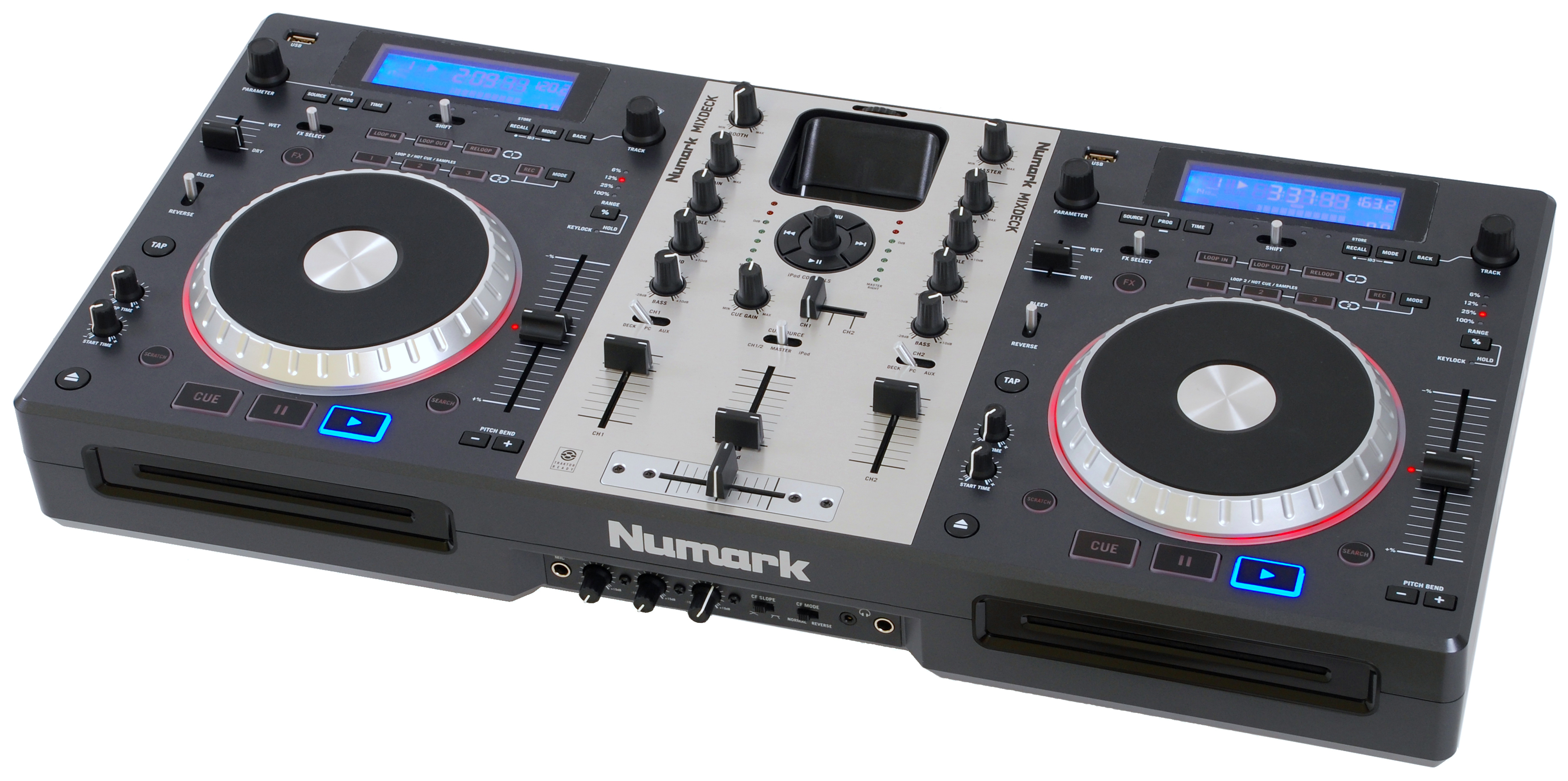 Odtwarzacz CD mp3 USB iPod, cyfrowy kontroler MixDeck firmy Numark